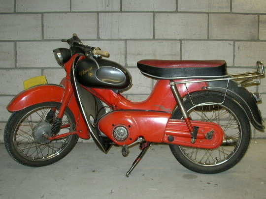 Voor artikel schakelbrommers